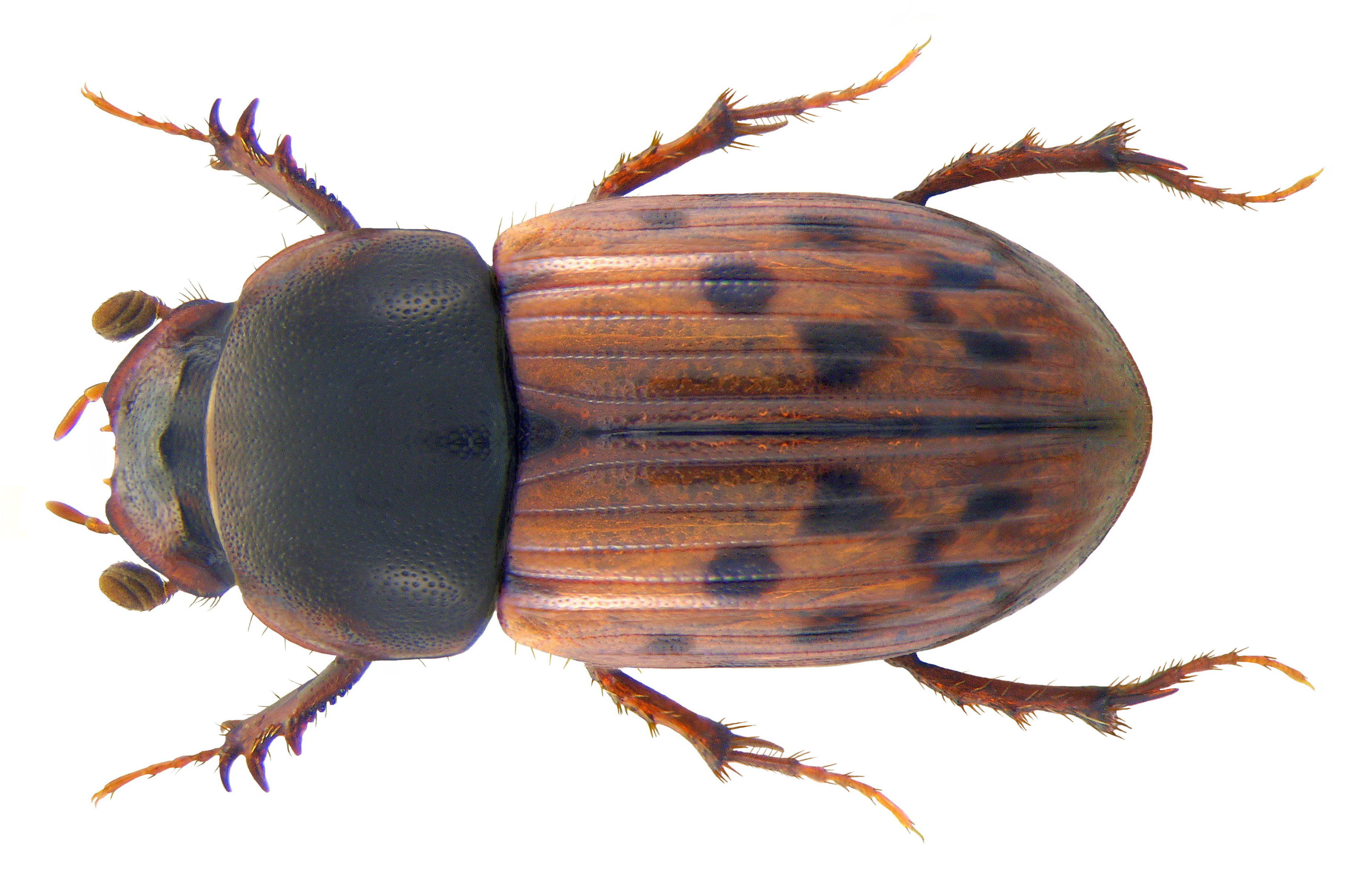 Familie: Scarabaeidae Groesse: 4-5 mm Verbreitung:m Südosteuropa, Mitteleuropa, Kaukasus Ökologie: in Gebirgswäldern, besonders in Wildlosung Fundort: Germania, Bayern, Oberfranken, Selbitz leg.det. U.Schmidt, 2002 Foto: U.Schmidt, 2009